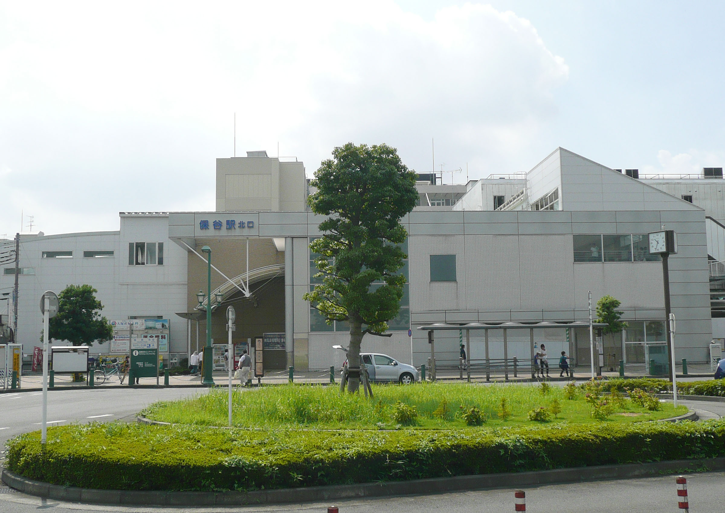 保谷駅北口